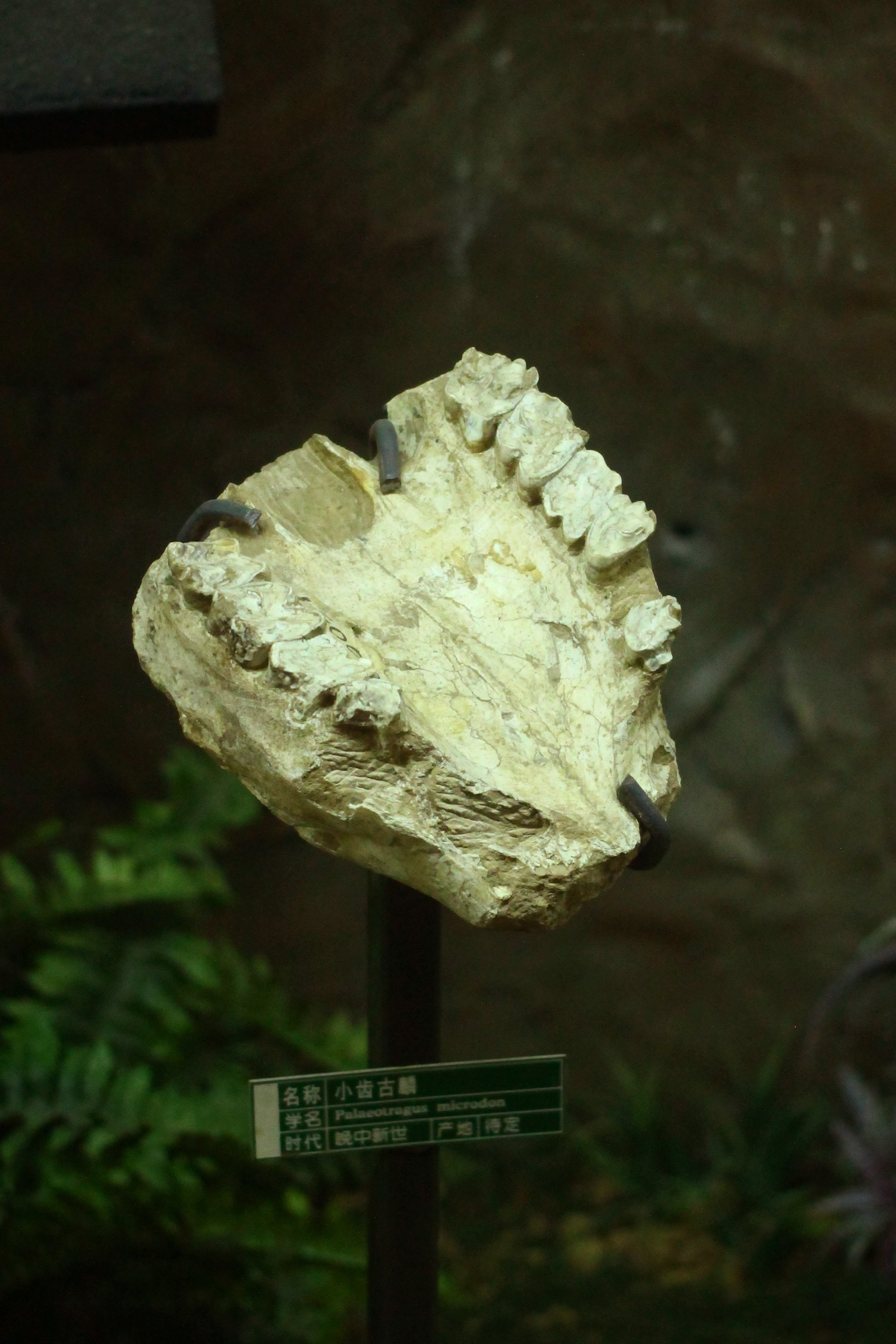 小齿古麟 Palaeotragus microdon。晚中新世。